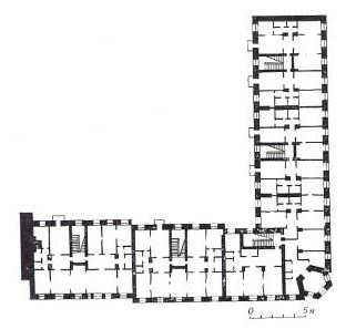 Мінск. План дома пад шпілем рагу Камуністычнай і Чырвонай вуліц